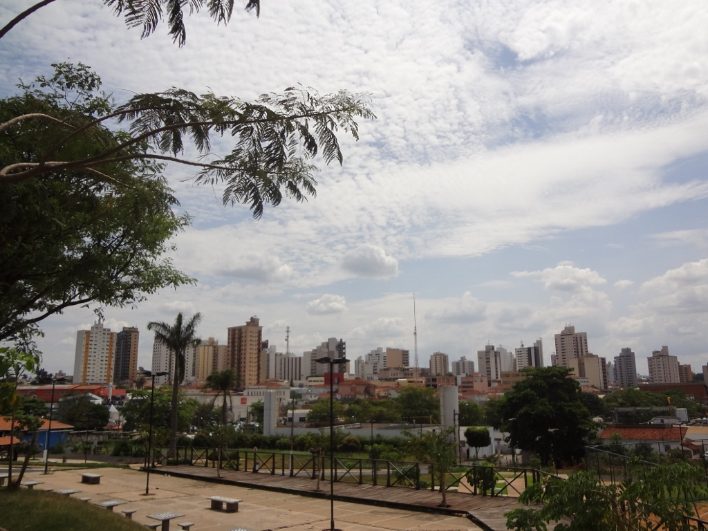 Região central da cidade de Catanduva, SP